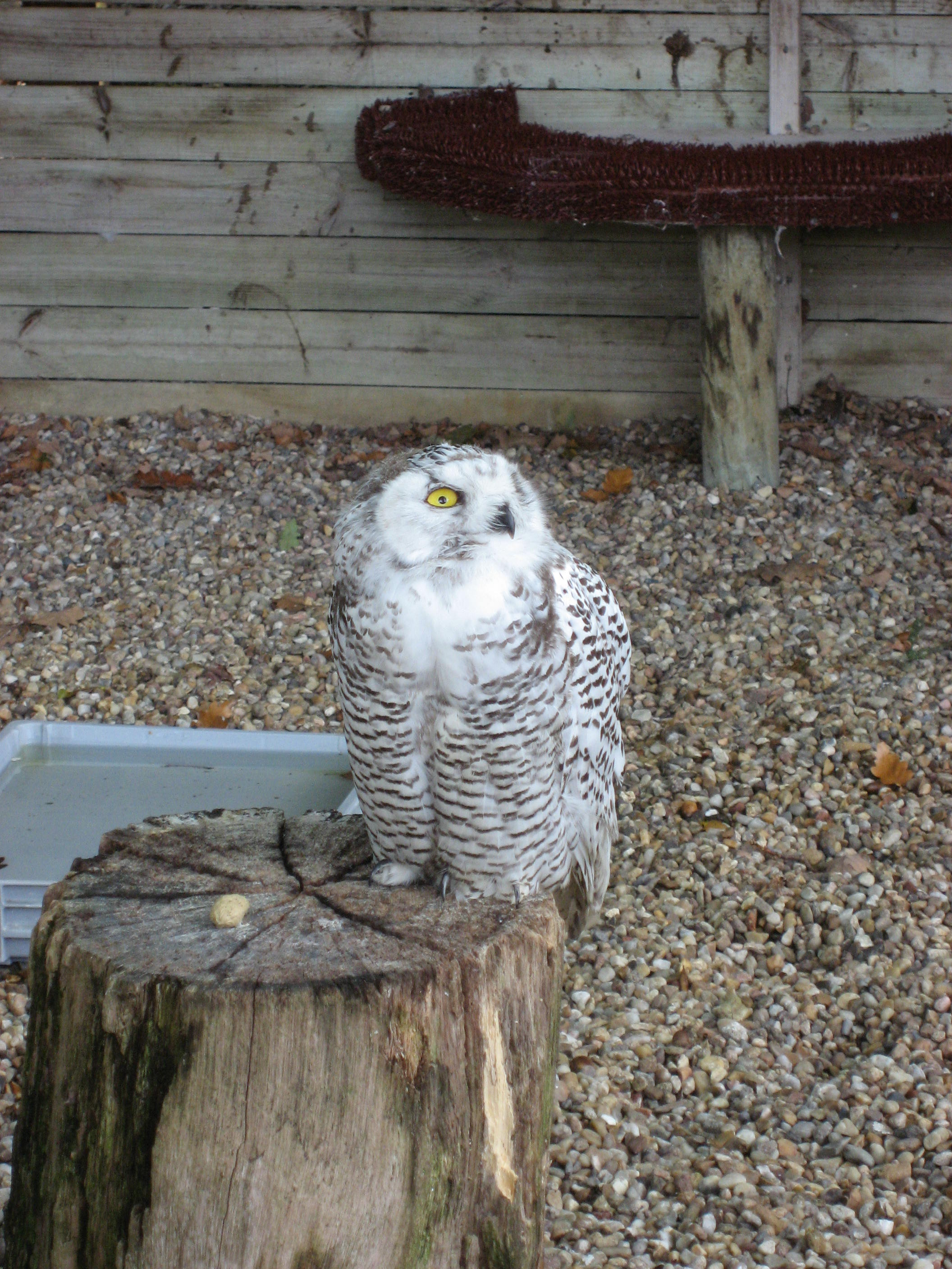 Chouette harfang (Bubo scandiacus) in Espace Rambouillet Map: 48° 37' 39" N 1° 52' 25" E